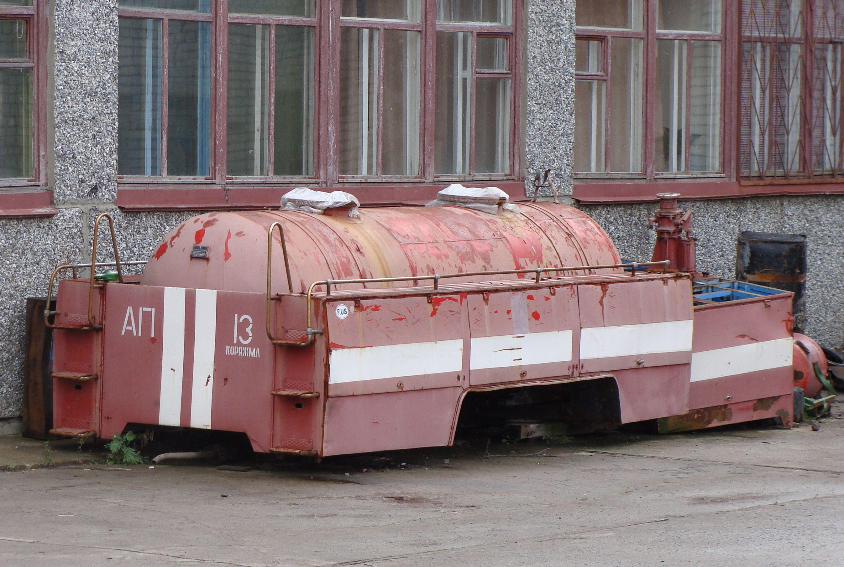 Емкость для порошка от автомобиля порошкового тушения АП-5